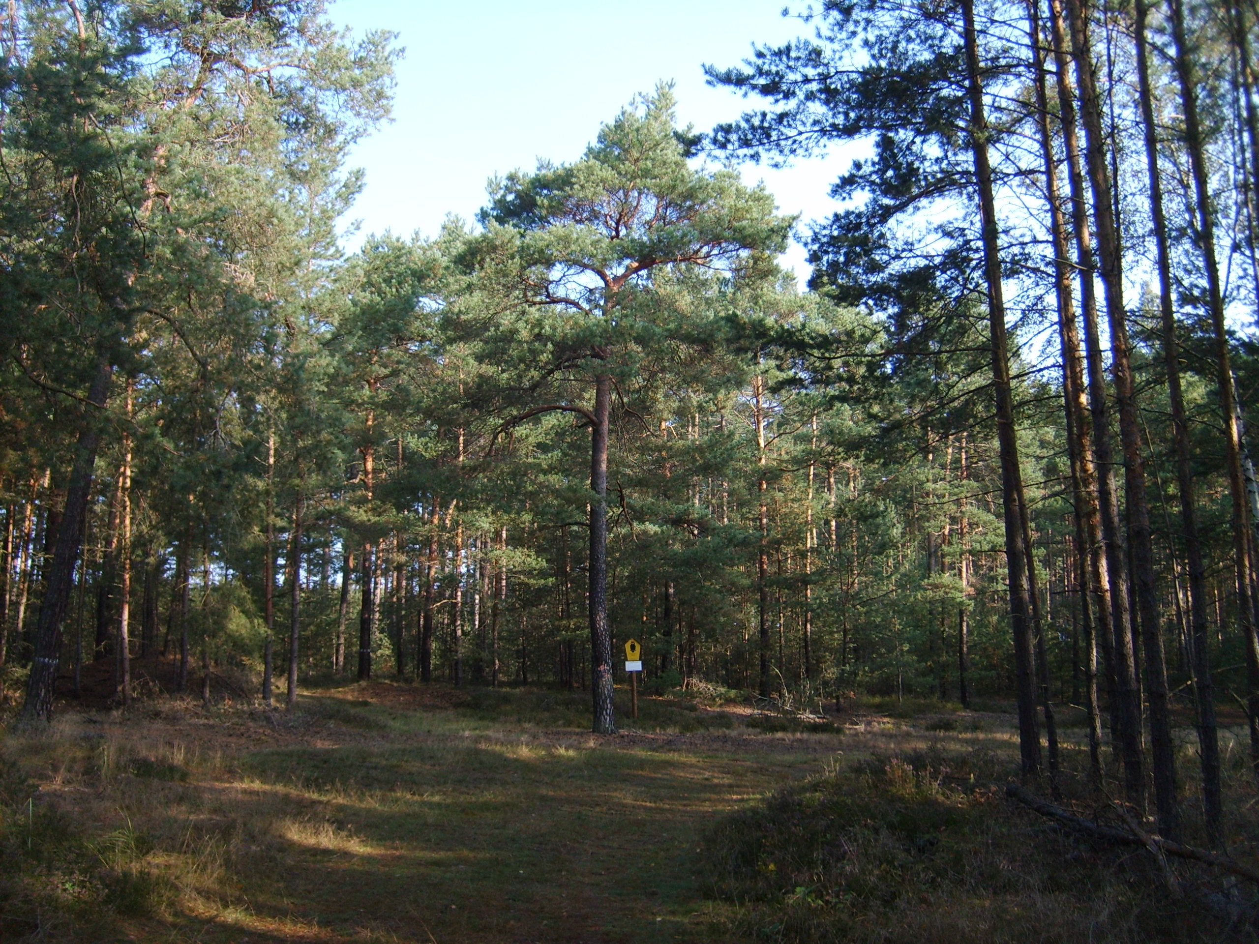 NSG Forsthaus Prösa